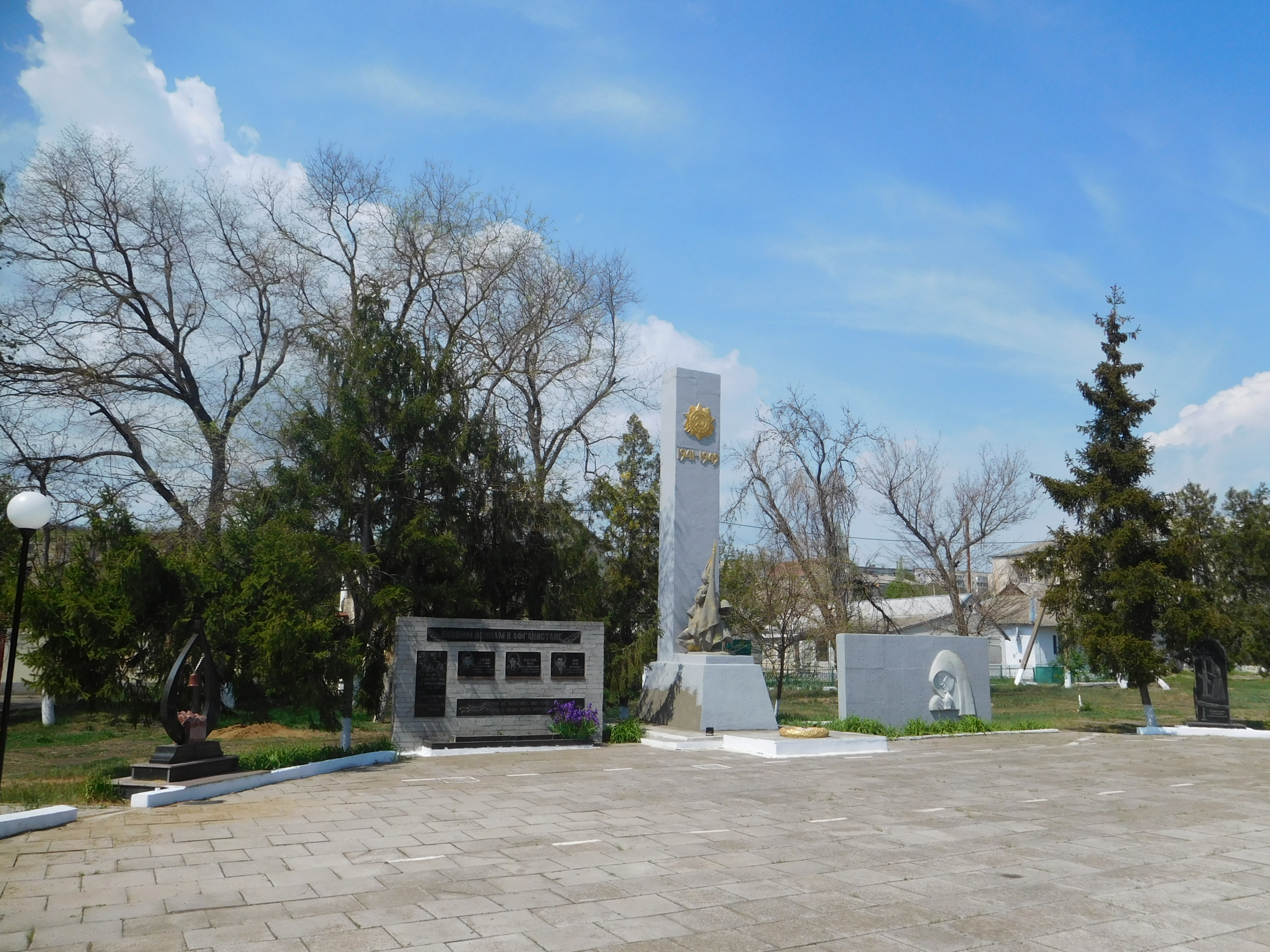 смт Іванівка, Одеська область